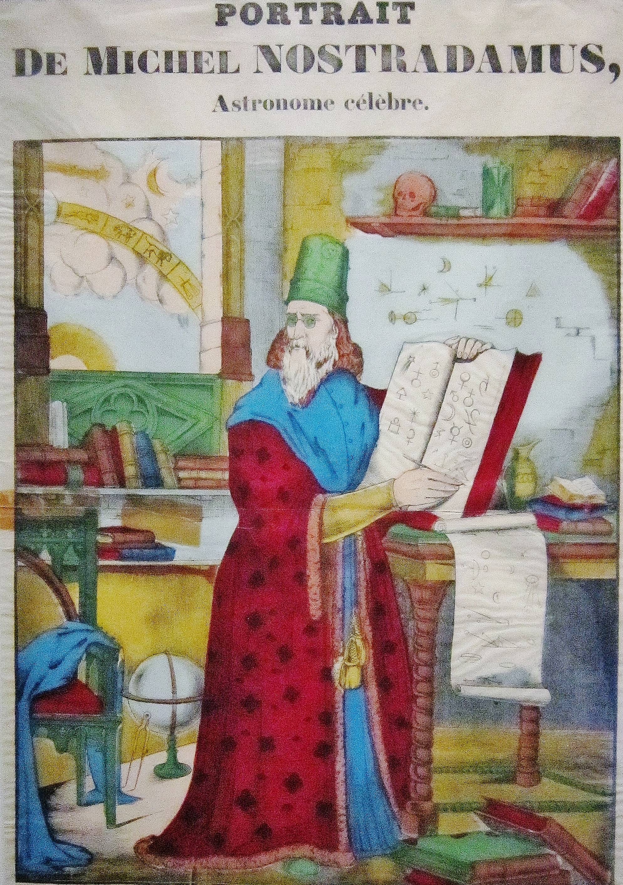 Image d'Epinal représentant Nostradamus. (Pellerin, XIXe siècle)